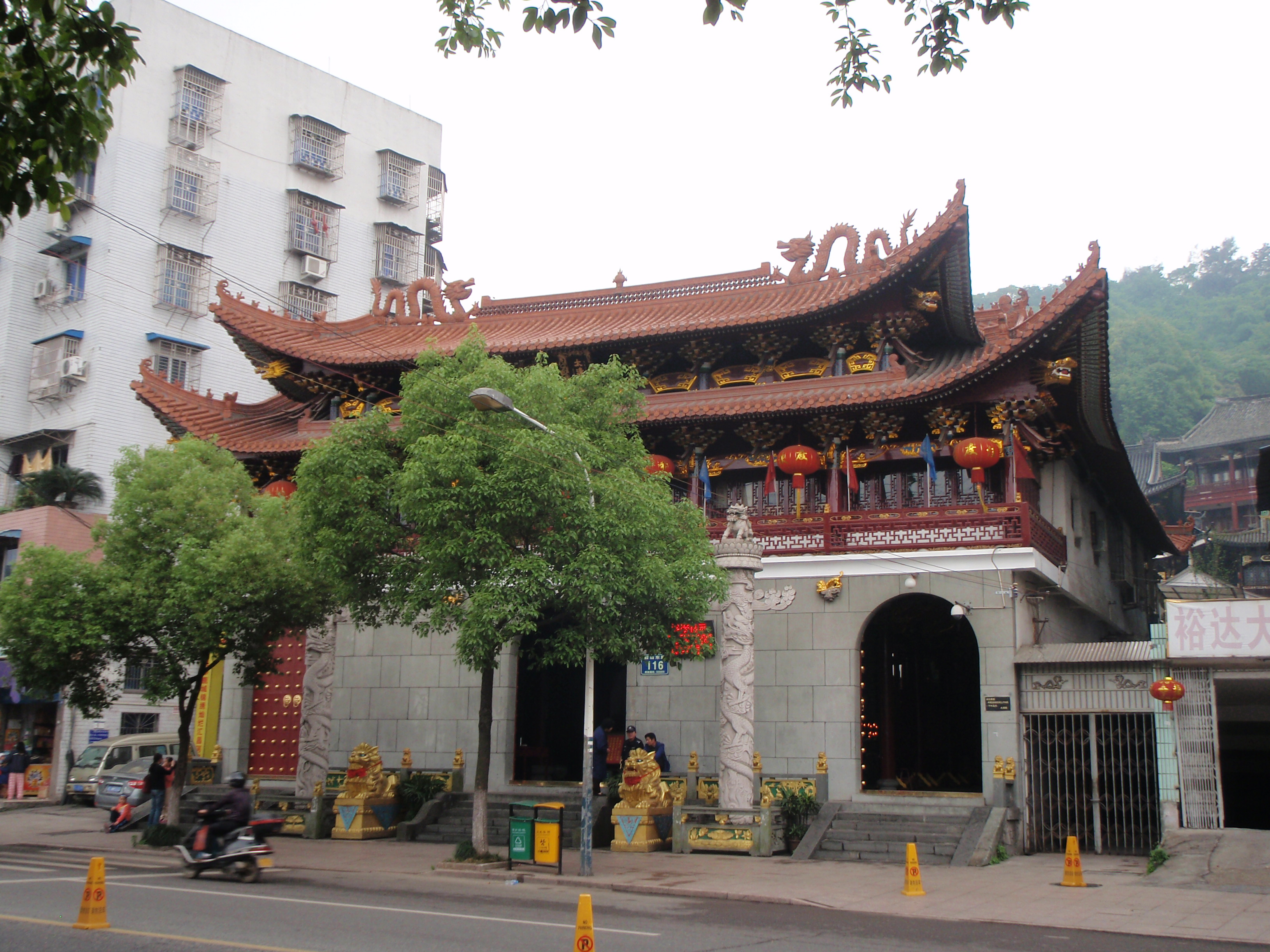 包公殿, Bao Gong Temple in Ouhai, Wenzhou, Zhejiang, China.